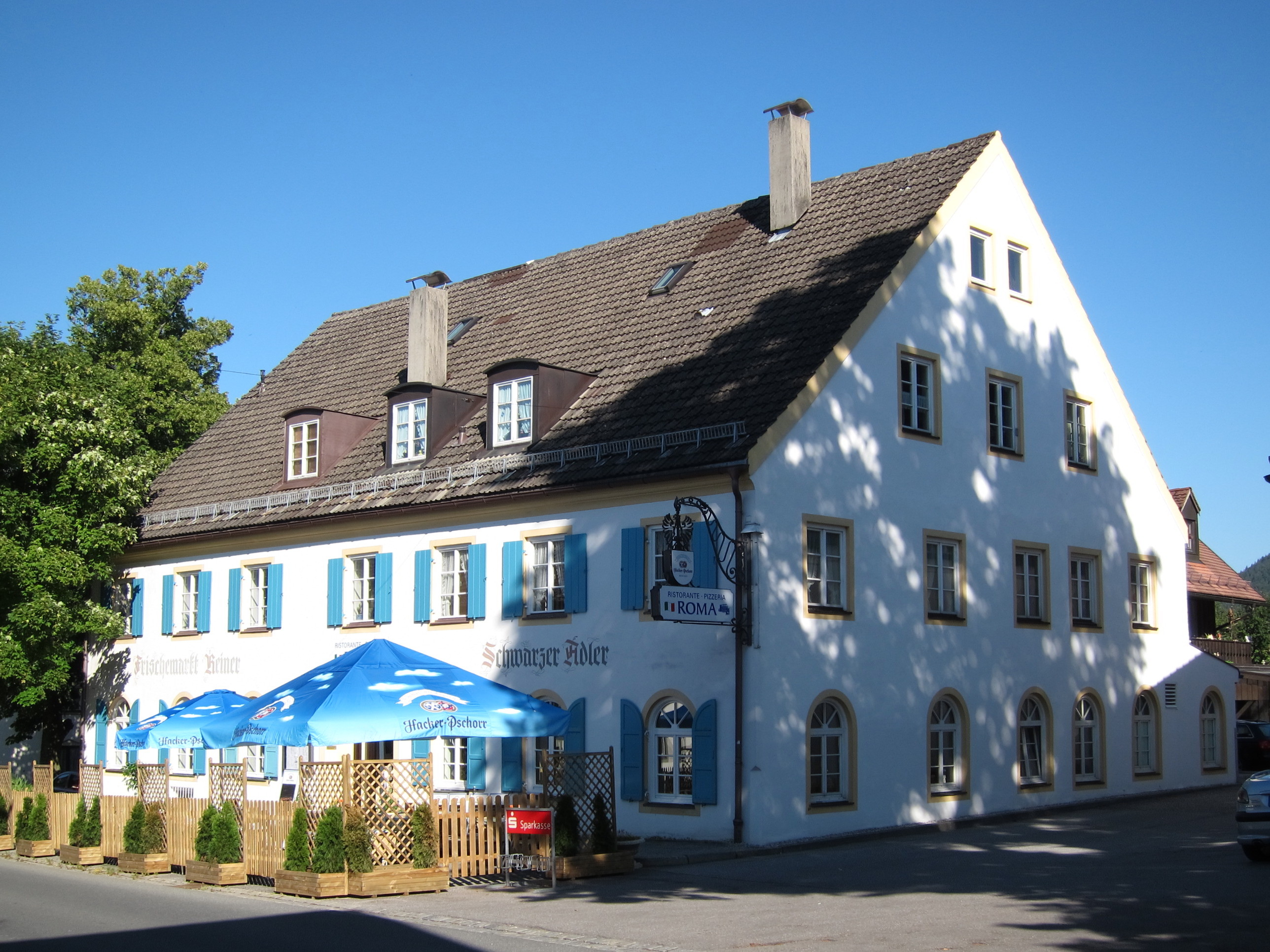 Gasthof Schwarzer Adler, Bad Kohlgrub, Haupstr. 17